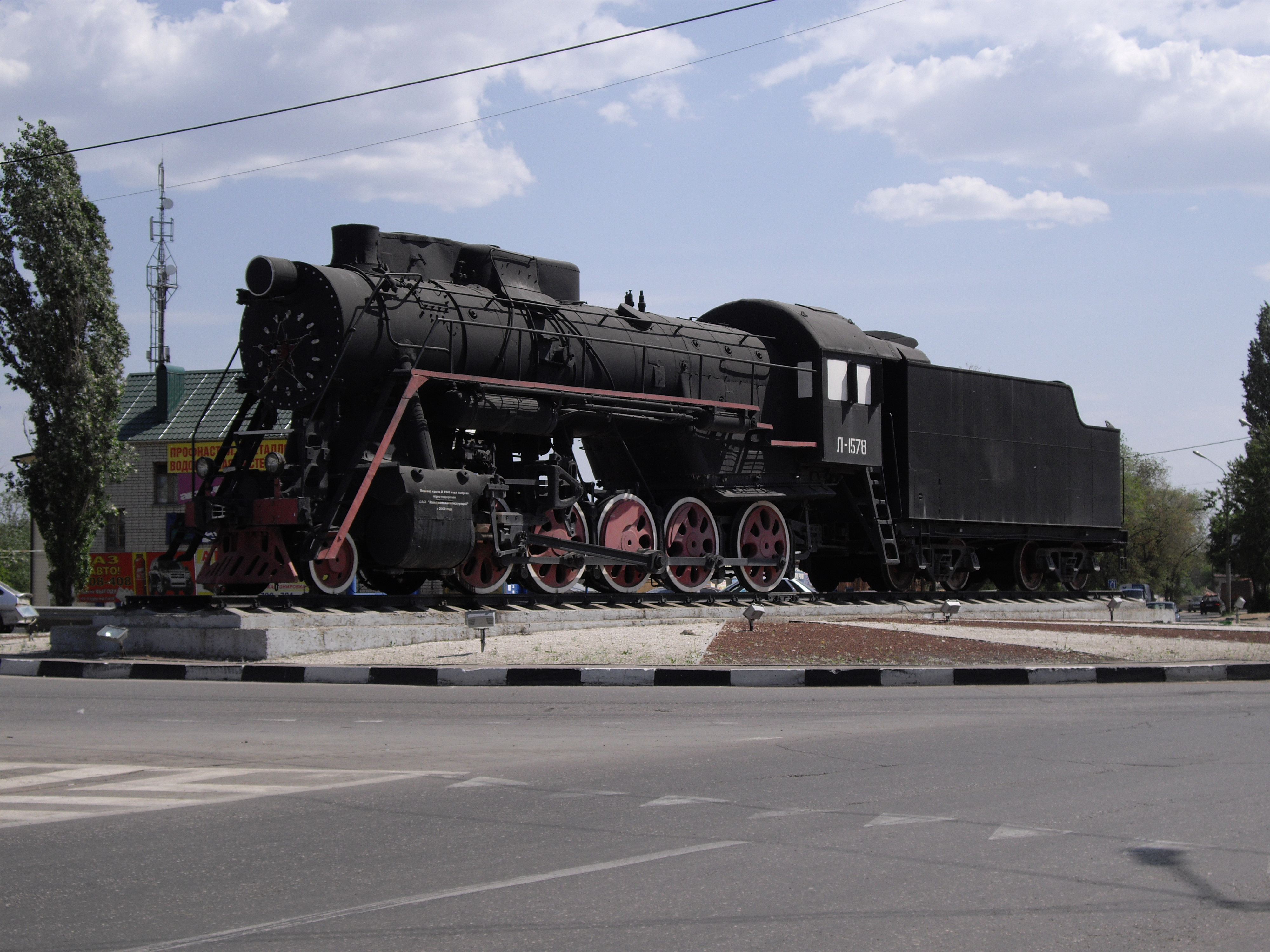 Паровоз Л-1578. В городе Энгельс, Саратовской области.